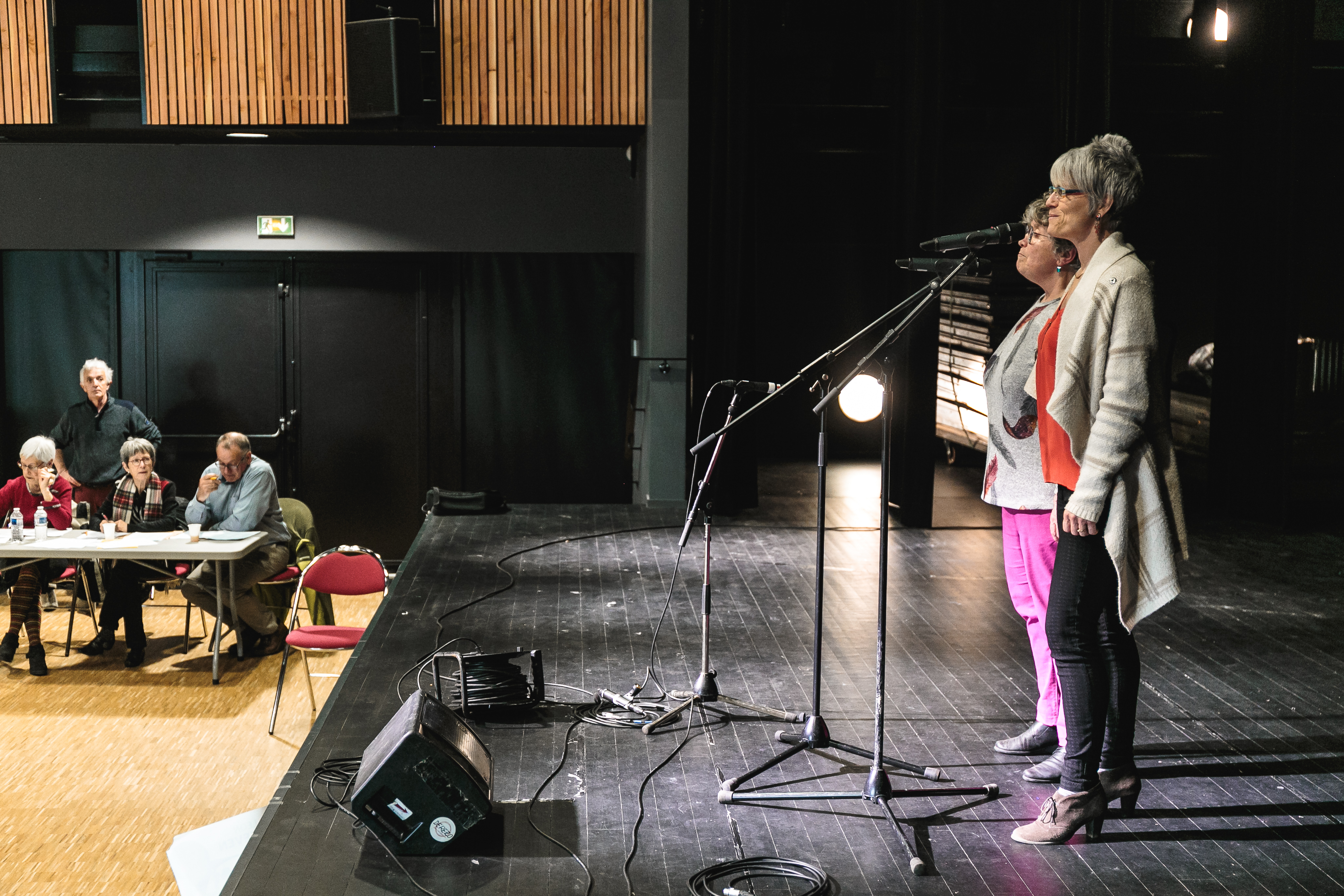 Le concours Kan ar Bobl dans la salle de L’Atelier à Lesneven organisé par l’association Ti ar vro Leon avec plusieurs catégories : scolaires (écoles publiques, privées et Diwan), chant à écouter, chant accompagné, chant à danser, instruments duo, contes.